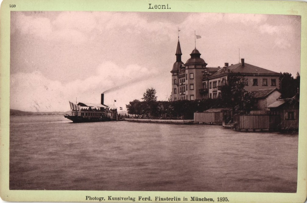 Leoni